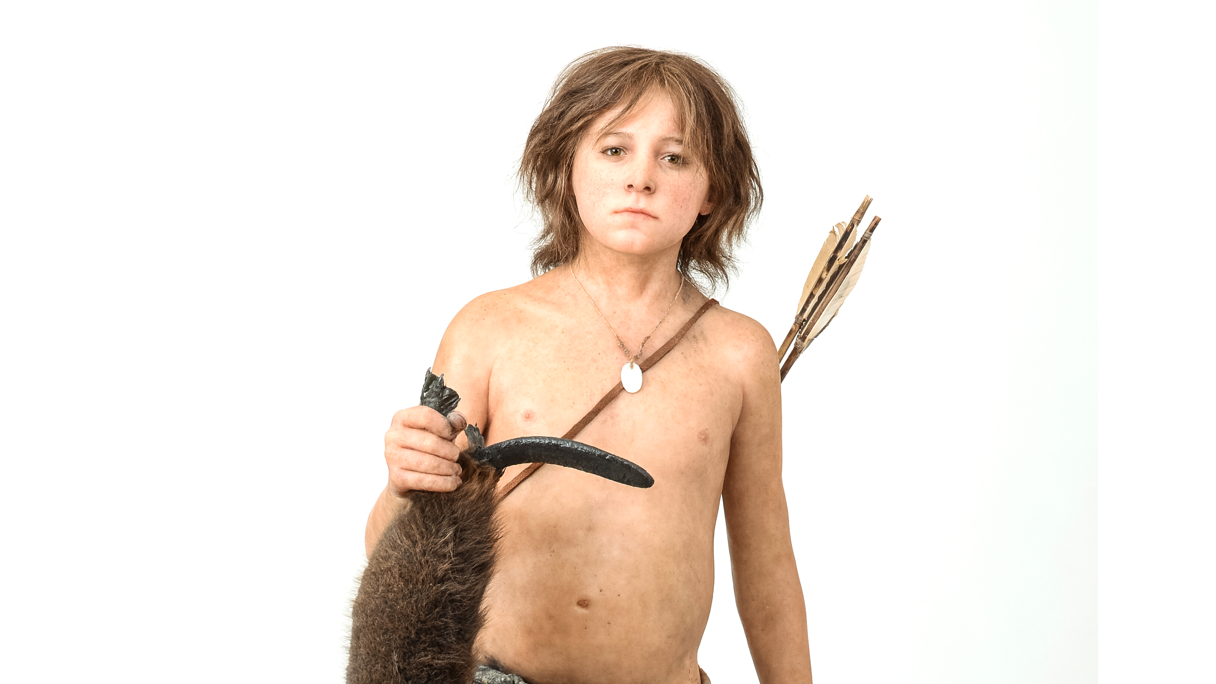 Ricostruzione di Homo sapiens del mesolitico.